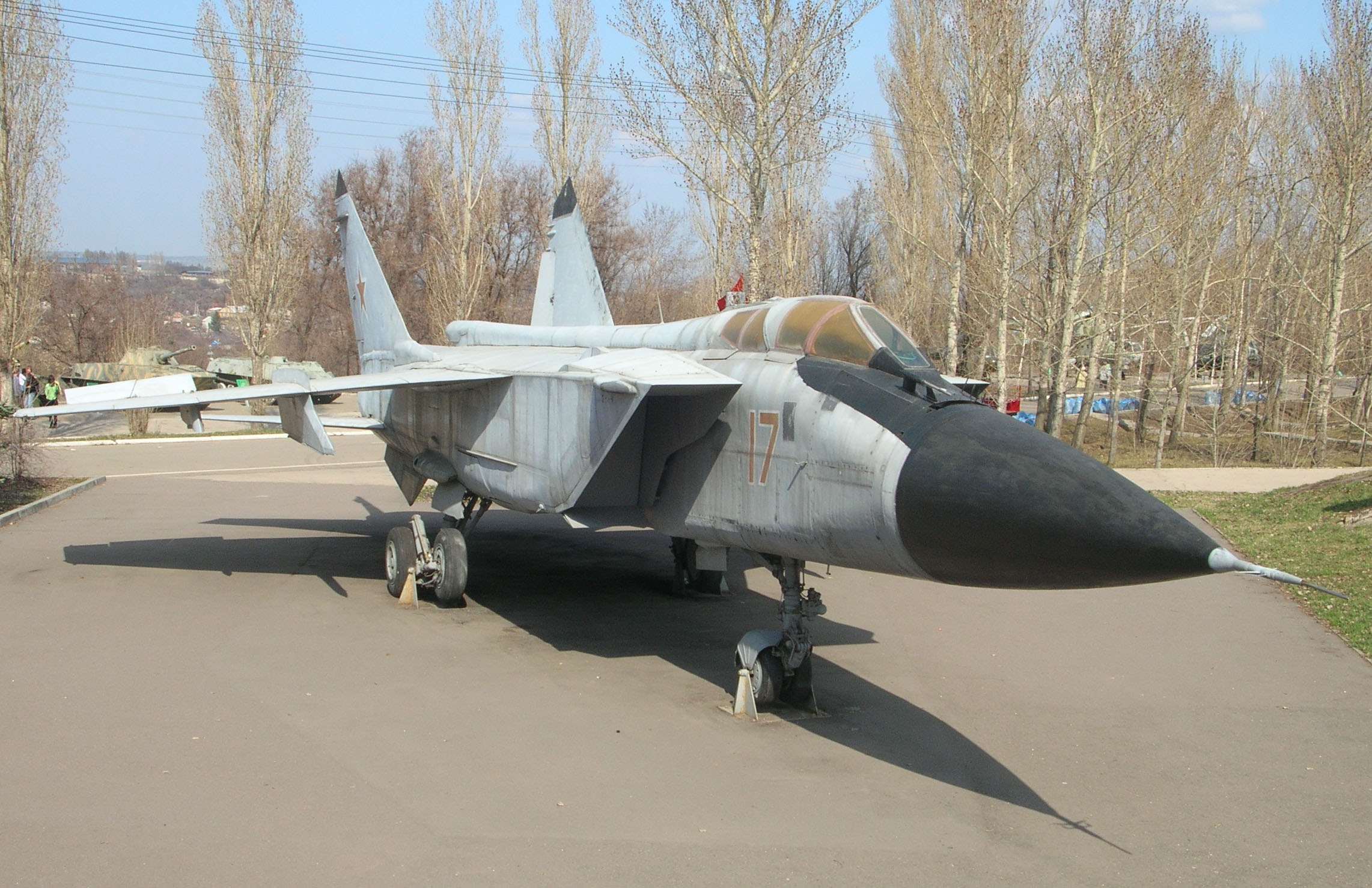 Истребитель-перехватчик МиГ-31. Парк Победы, г. Саратов.